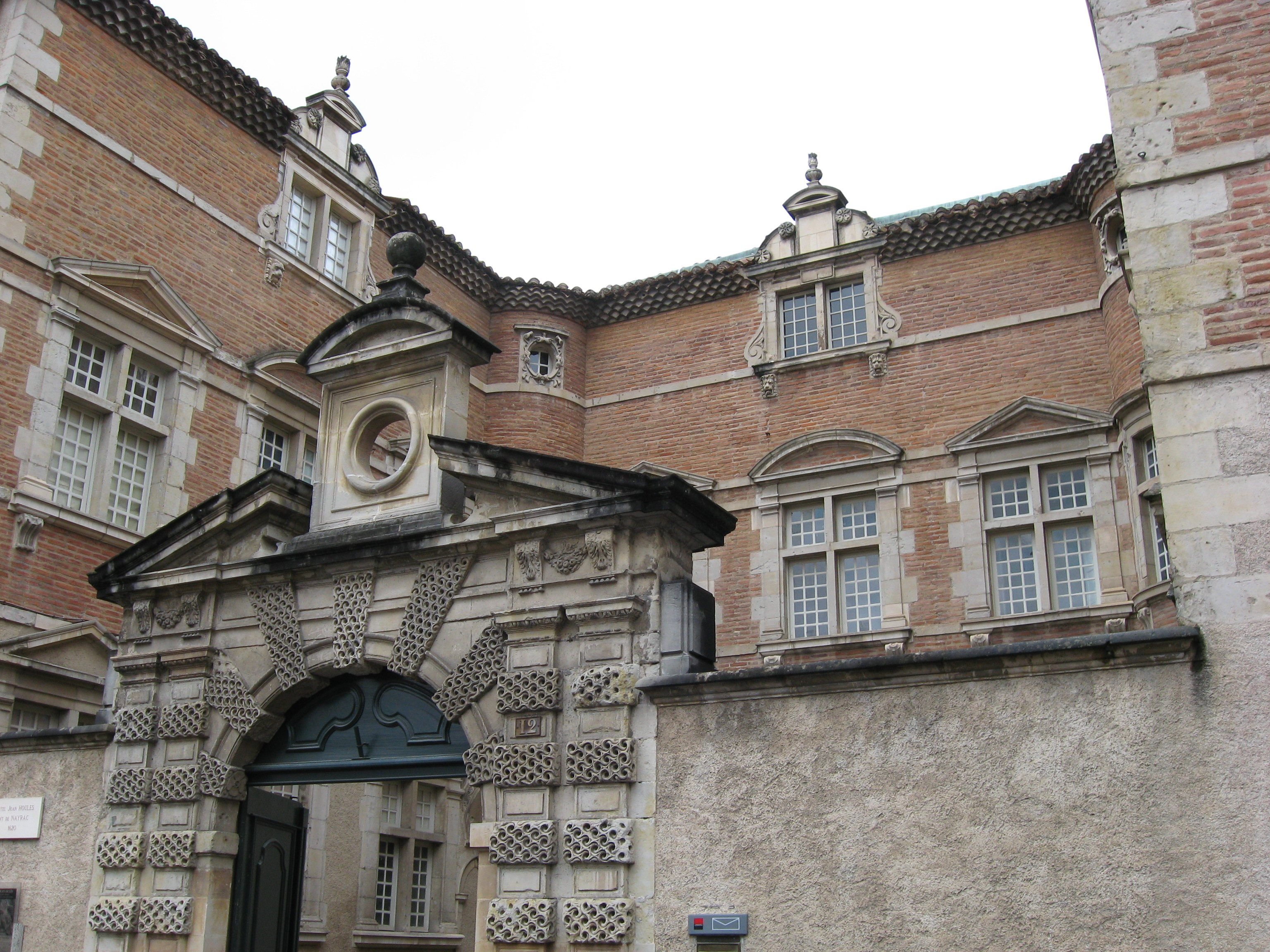 Hôtel Nayrac à Castres